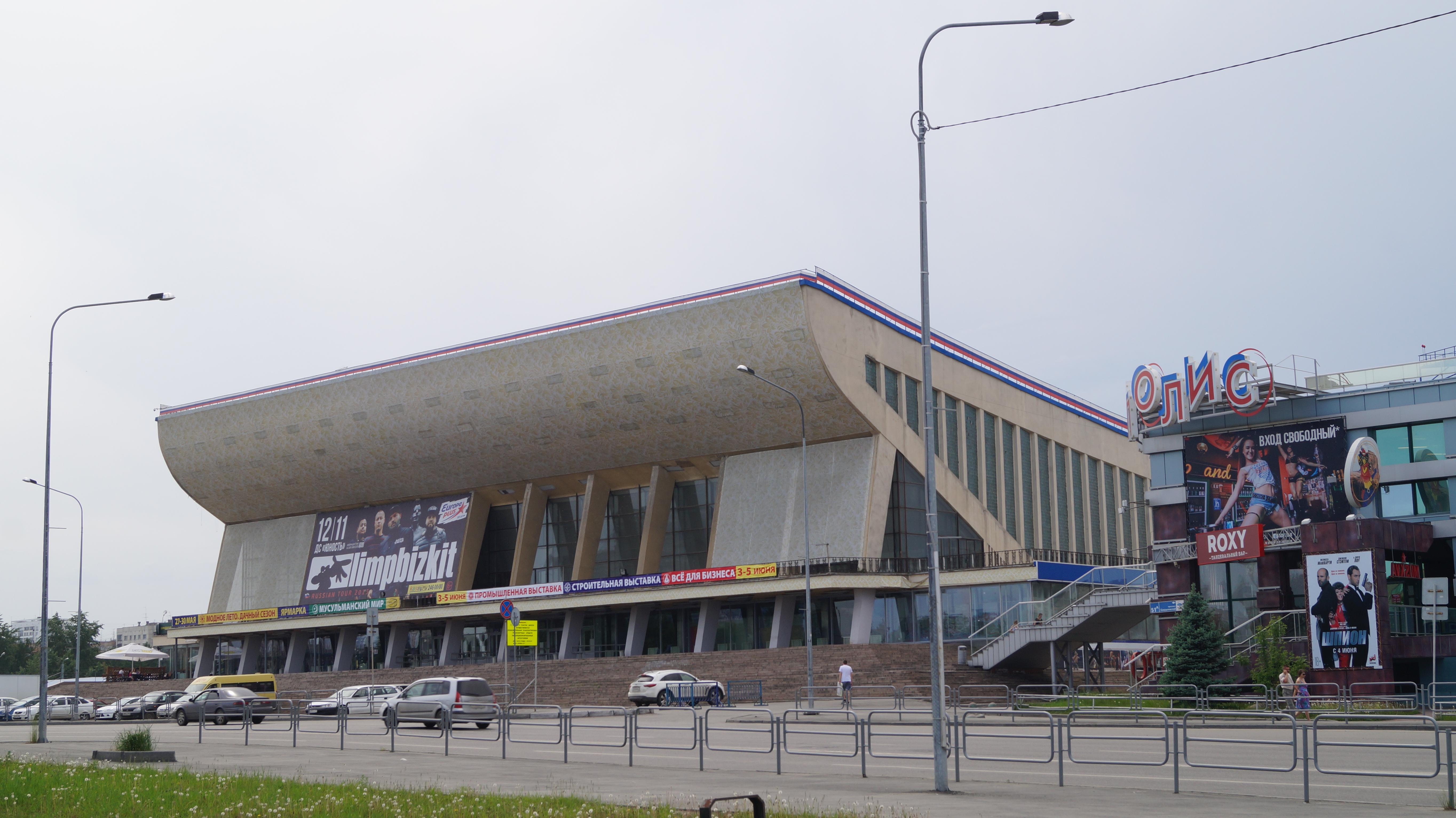 Дворец Спорта «Юность» в Челябинске.